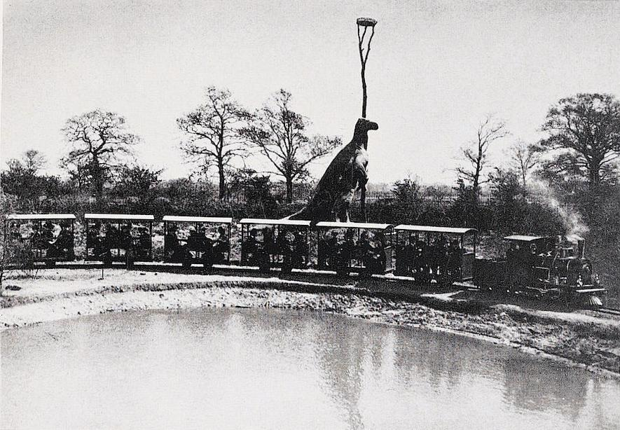 Rundbahn von 600 mm Spurweite im Hagenbeckschen Tierpark mit 2B-Baulokomotive 'Drache'